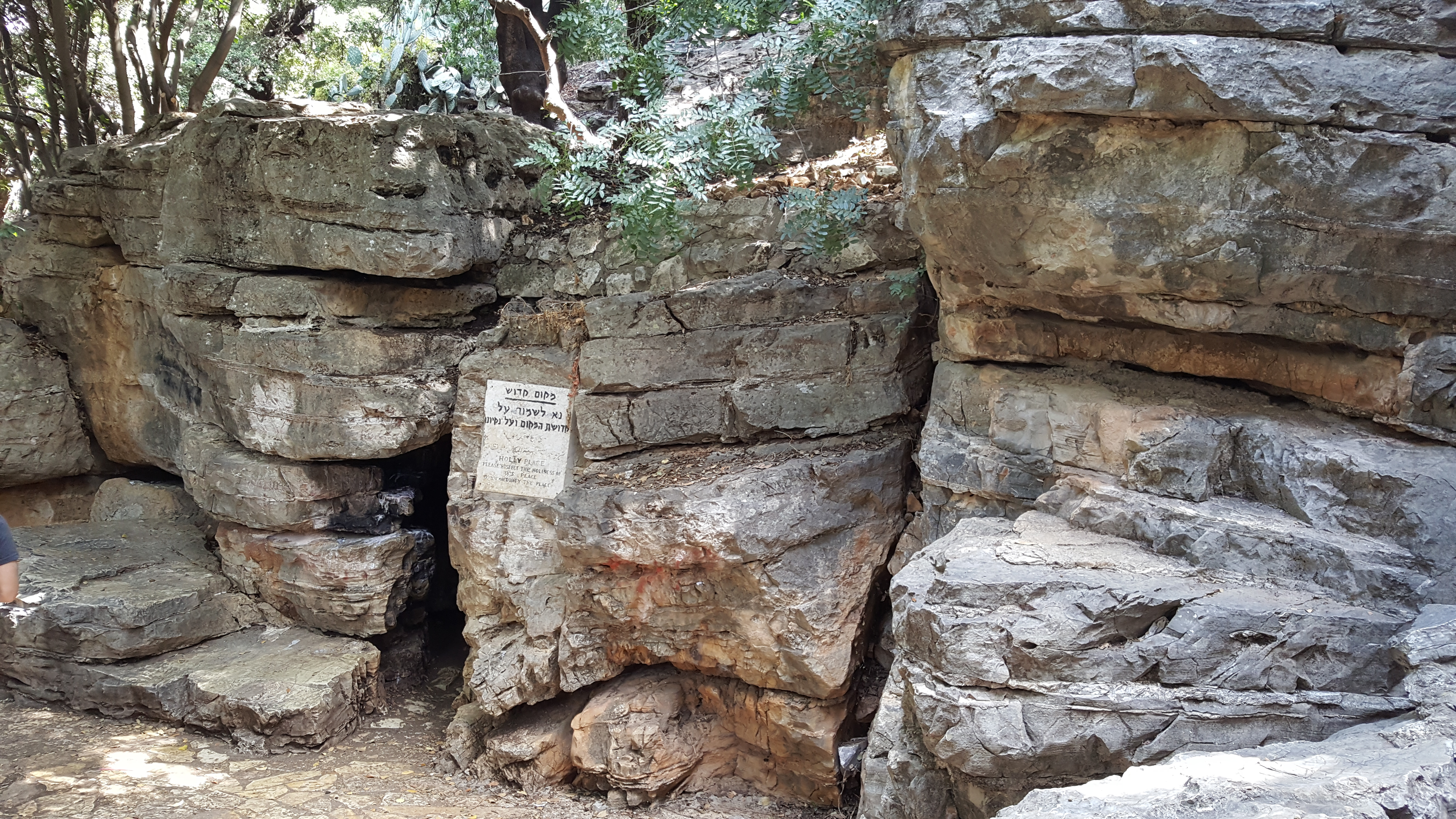 מרכז מבקרים המנוהל על ידי עמותה, ששימורו החל לפני כעשור שנים. המרכז ממוקם במבנה הקרוי "בית רחל ינאית" על שמה של רעיית נשיא מדינת ישראל לשעבר, רחל ינאית בן-צבי. תפקידו של המרכז להנציח ולשמר את מורשת יהודי פקיעין ואת מורשת משפחת זינאתי עתיקת-היומין. מרגלית זינאתי, הנצר האחרון למשפחה, מתגוררת במבנה ושומרת על בית הכנסת העתיק בפקיעין הממוקם בסמוך.